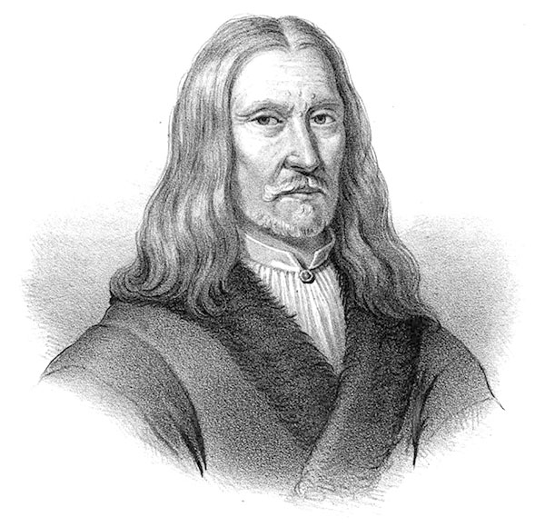 Johan Stiernhöök (1596-1675)